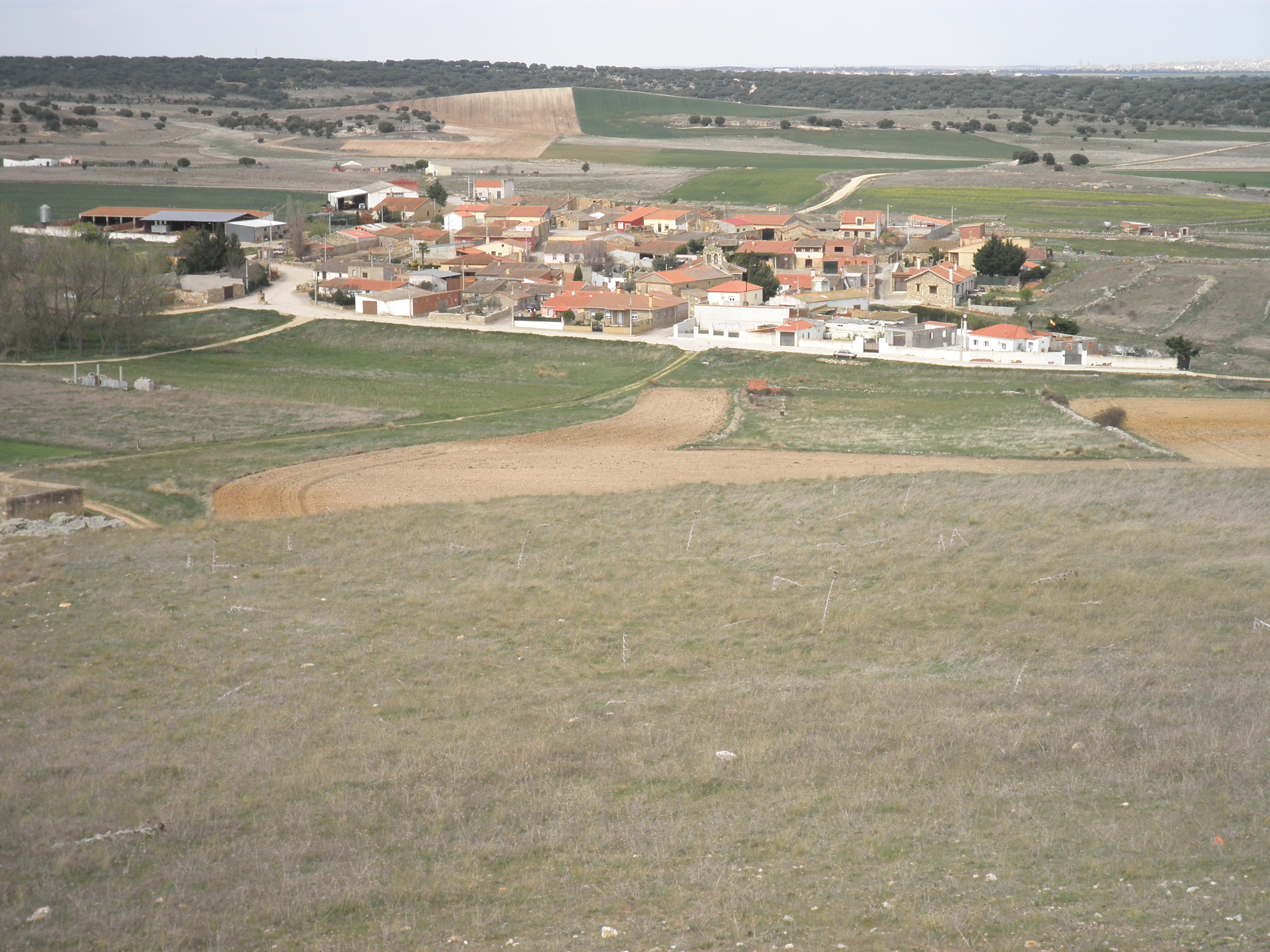 Vistas del casco urbano de Carpio-Bernardo